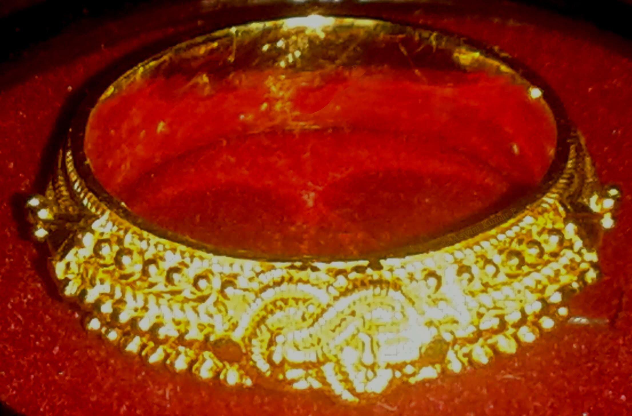 Payyannur Pavithra ring